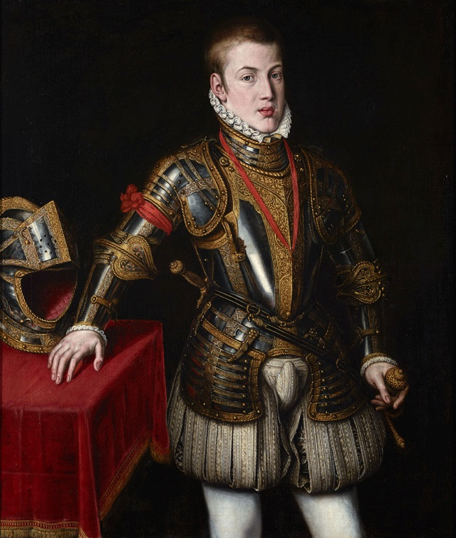 Retrato del príncipe de Asturias Carlos de Austria, que fue el hijo primogénito del rey Felipe II de España y de la reina María Manuela de Portugal, primera esposa de Felipe II.